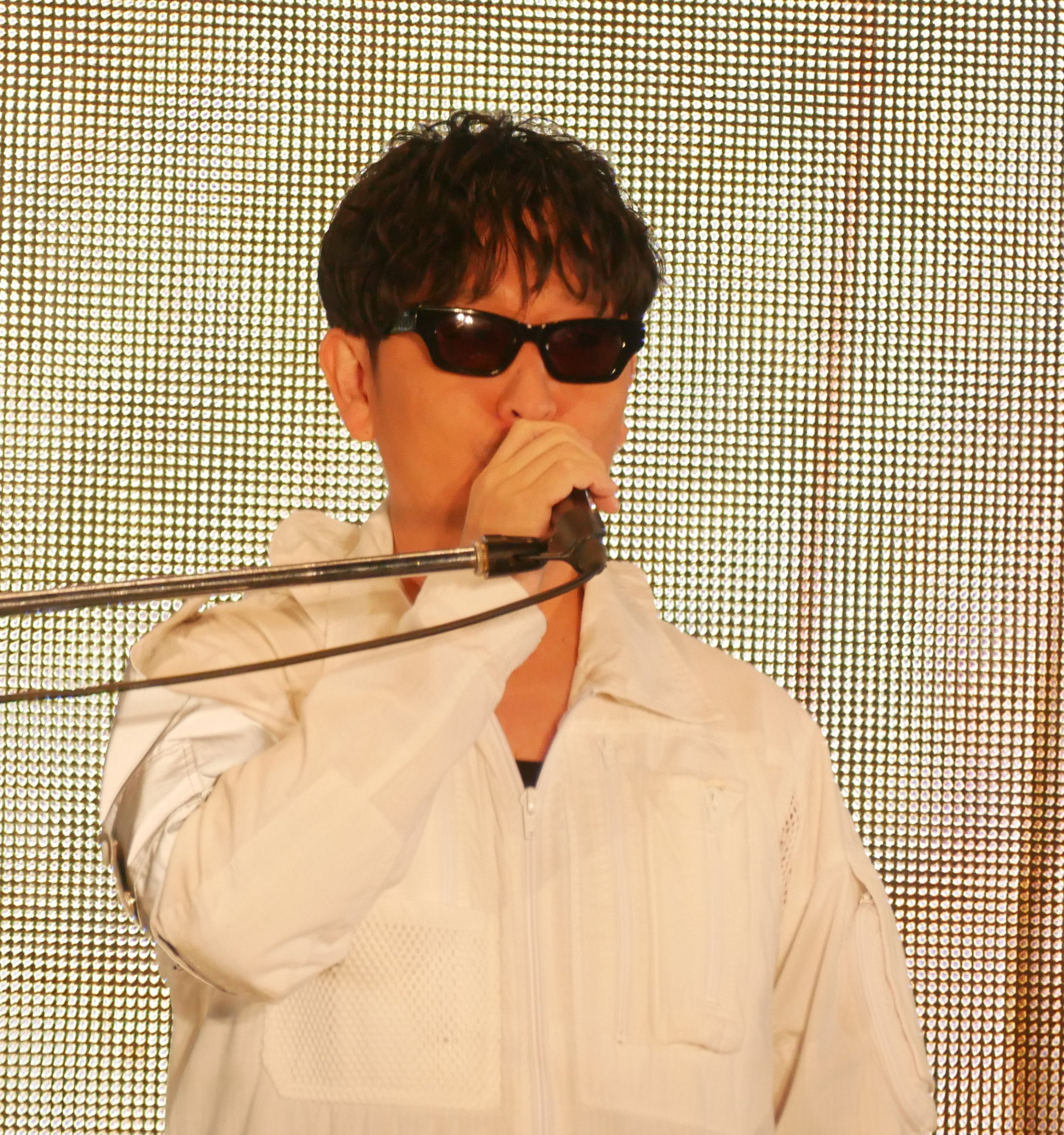 m-flo's Taku Takahashi Panasonic Lumix DMC-GX7 Mark II